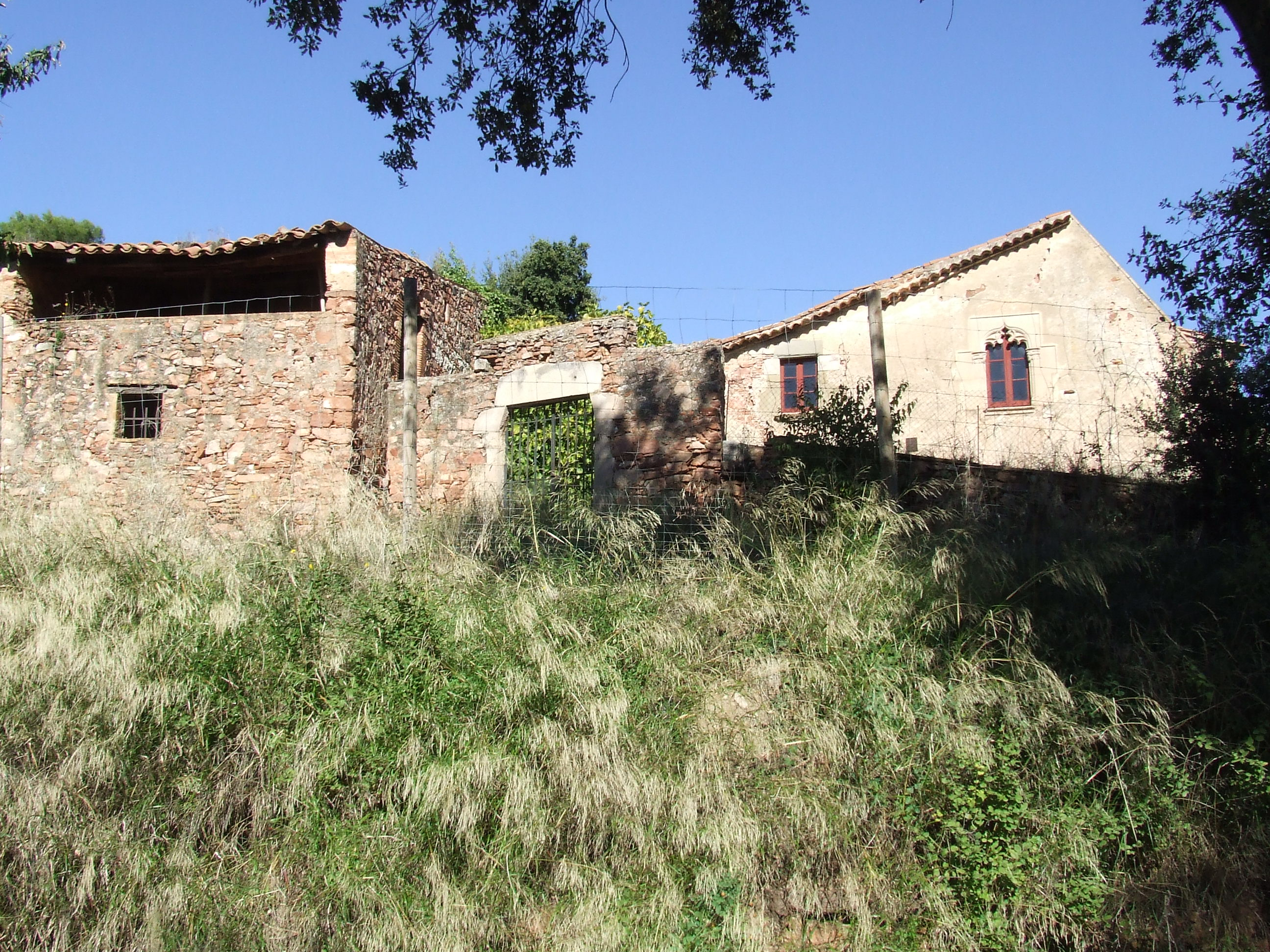 Can Garriga del Solell (Riells del Fai, Bigues i Riells, Vallès Oriental)